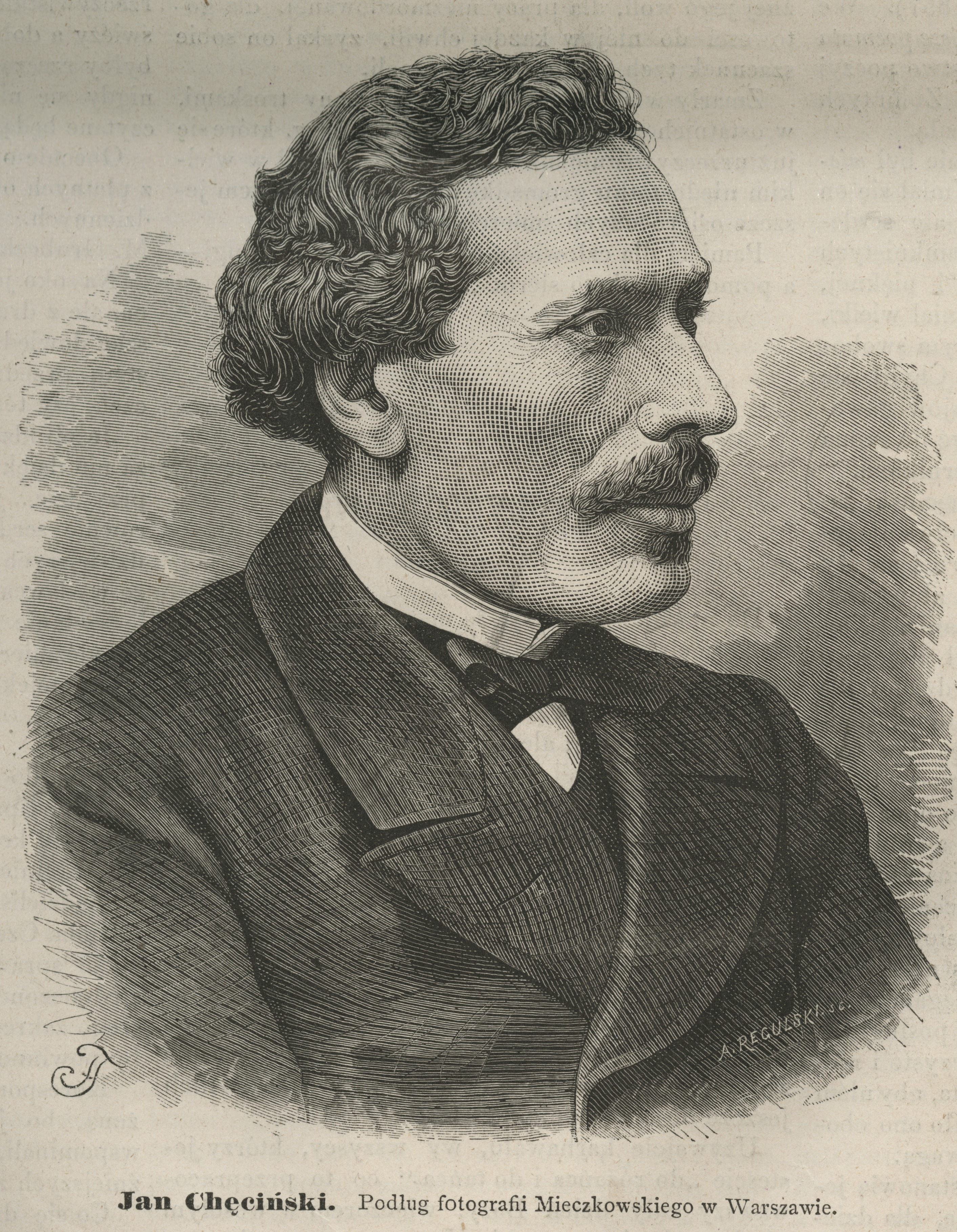 Jan Chęciński : (Podług fotografii Mieczkowskiego w Warszawie)